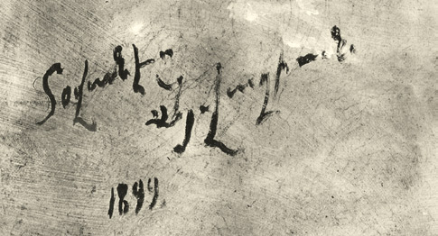 Подпись Айвазовского армянскими буквами